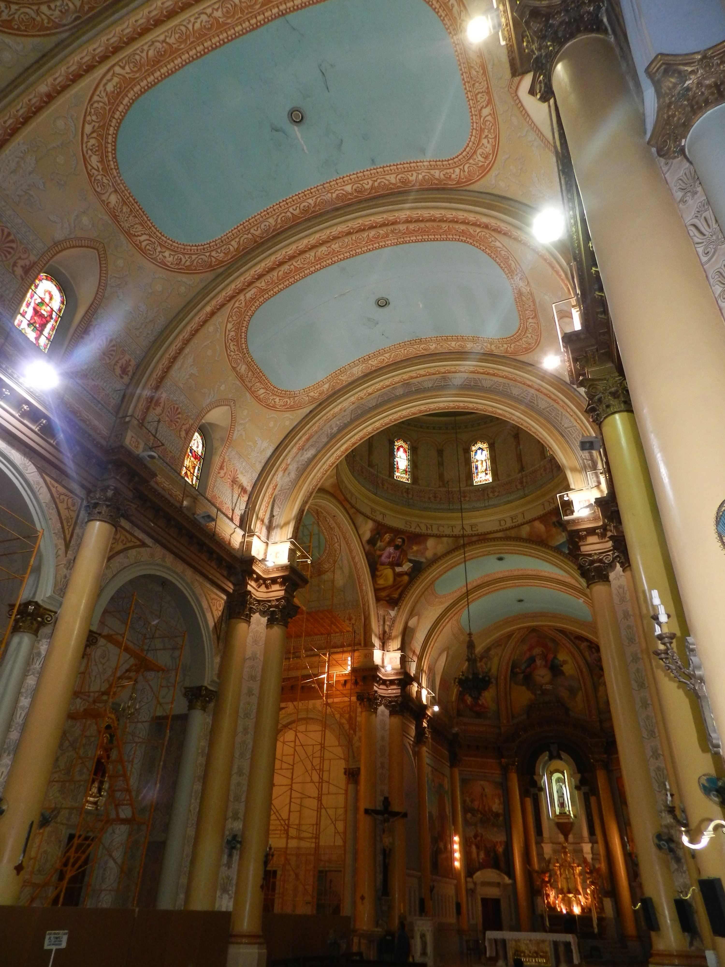 Vista de la nave central.